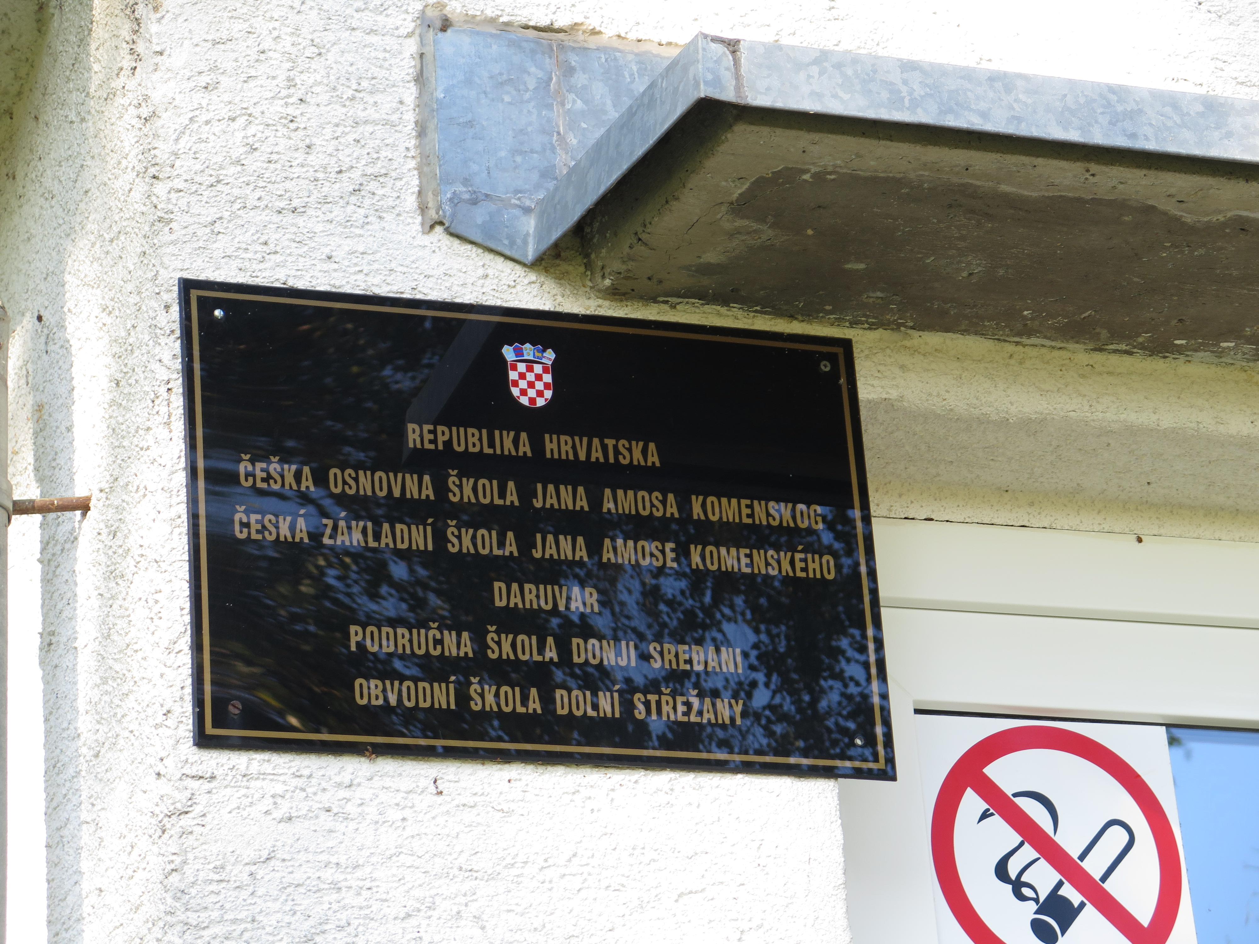 Označení dolnostřežanské školy